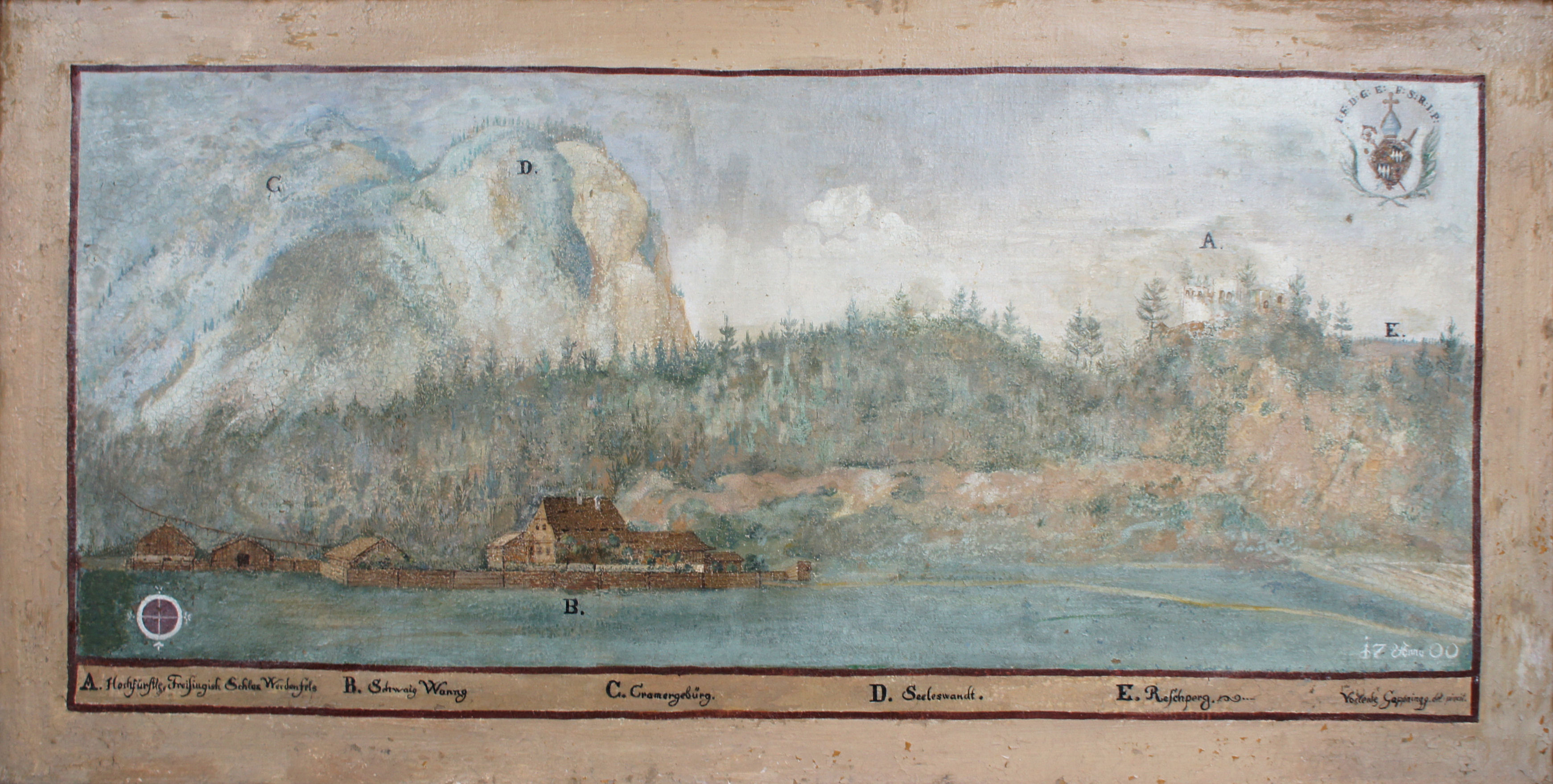 Gemälde aus einer Serie mit Darstellungen von Besitztümern des Hochstifts Freising im Fürstengang zwischen Fürstbischöflicher Residenz und Freisinger Dom.